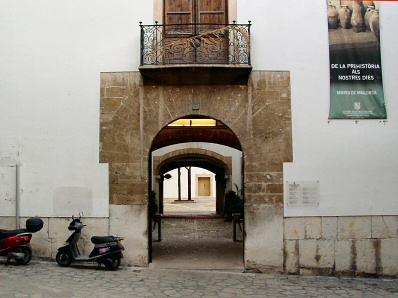 Famosa porta del Museu de Mallorca